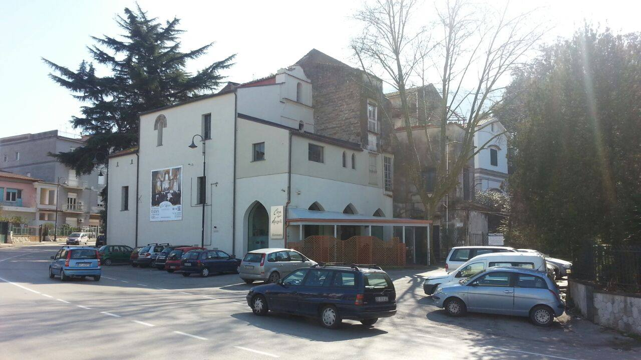 Foto dell'ex convento di Sant'Angelo in Grotta, a Nocera Inferiore (Chiesa di Sant'Angelo in Grotta)